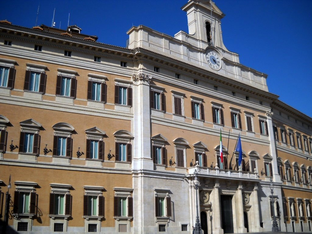 Palazzo_Parlamento Roma